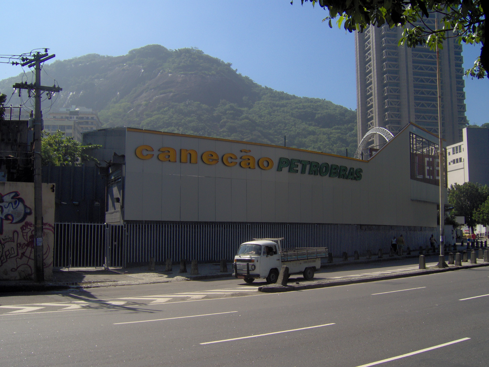 Canecão, casa de espetáculos na cidade do Rio de Janeiro, Brasil.